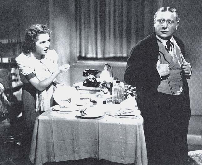 foto sul set del film Il birichini di papà con Chiaretta Gelli 1942